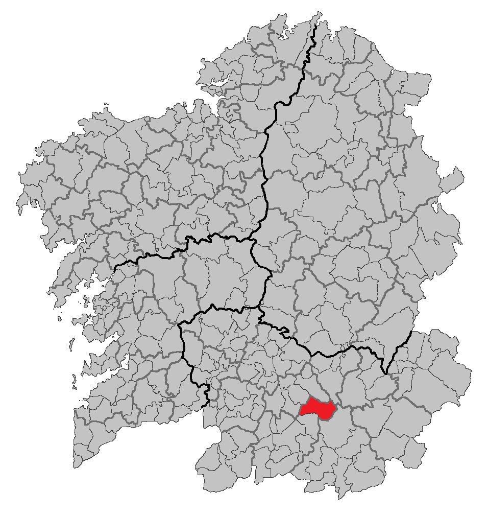 Mapa coa localización do concello de Vilar de Barrio.